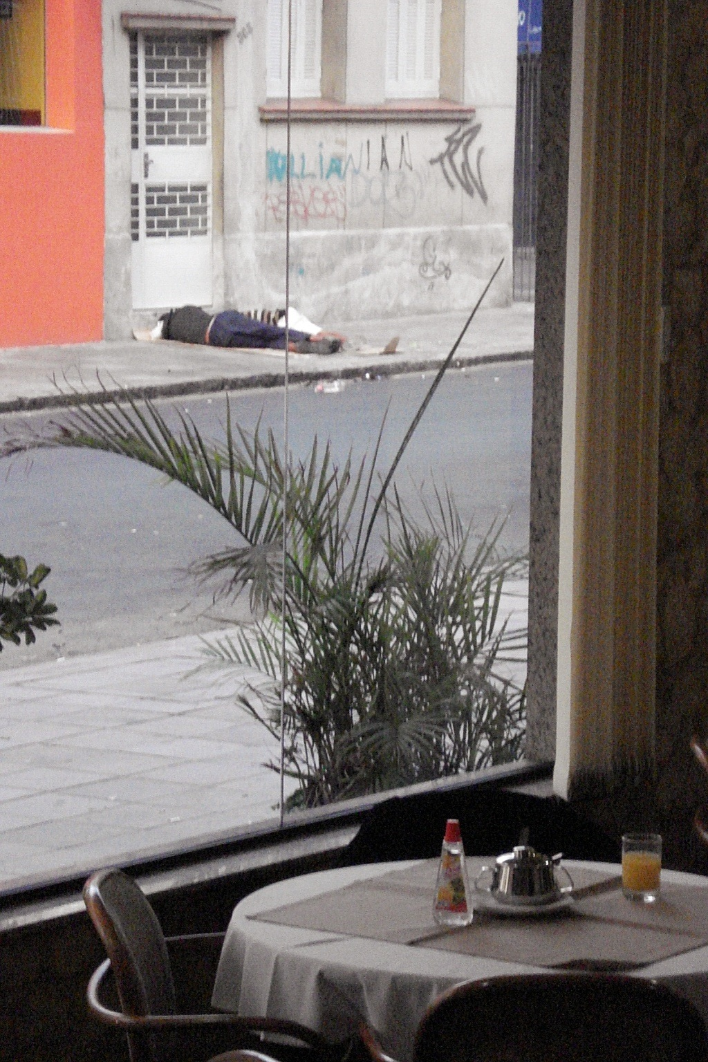 Itinérants dormant sur les trottoirs de Porto Alegre, Brésil.